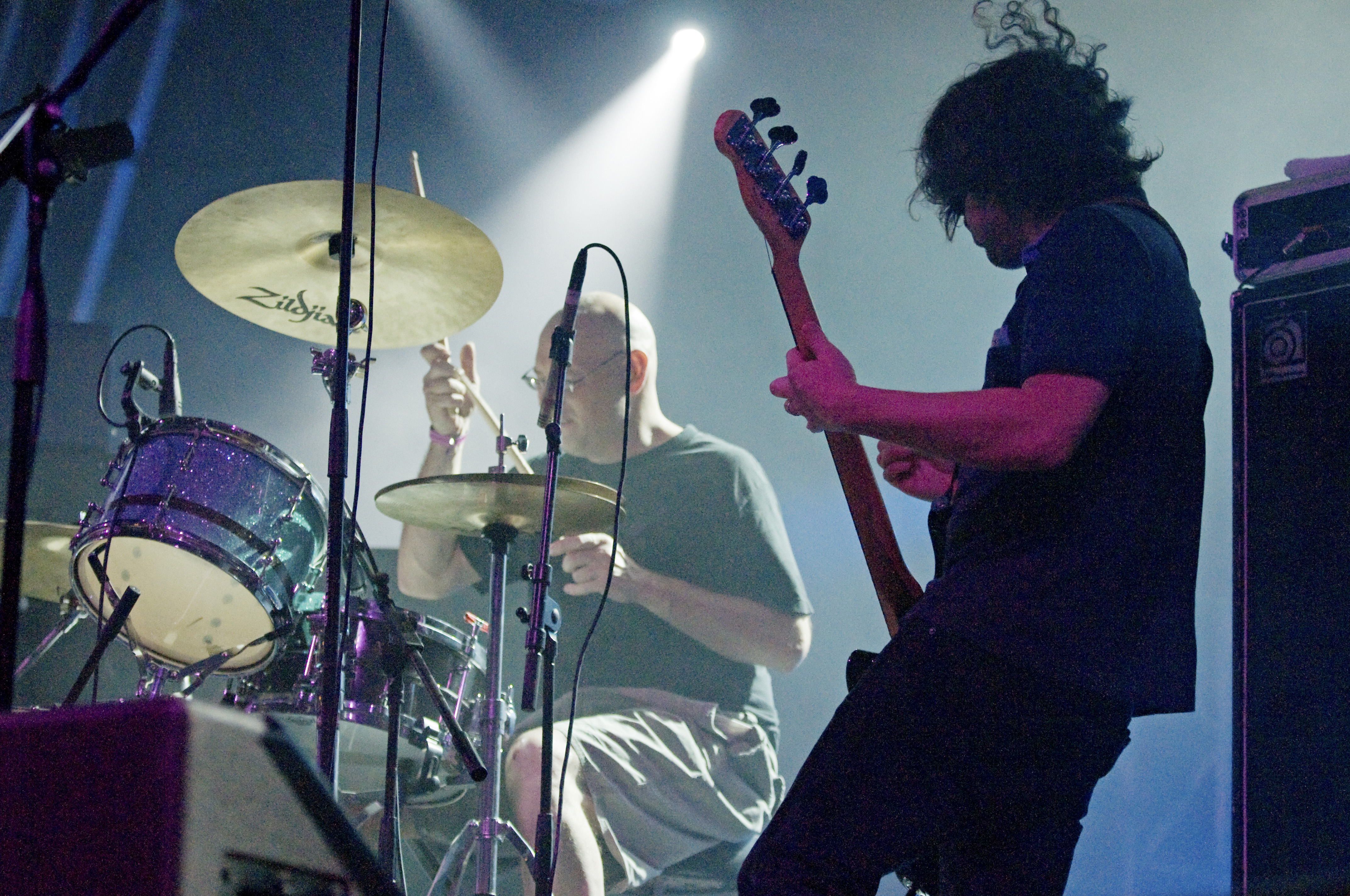 Dinosaur Jr.